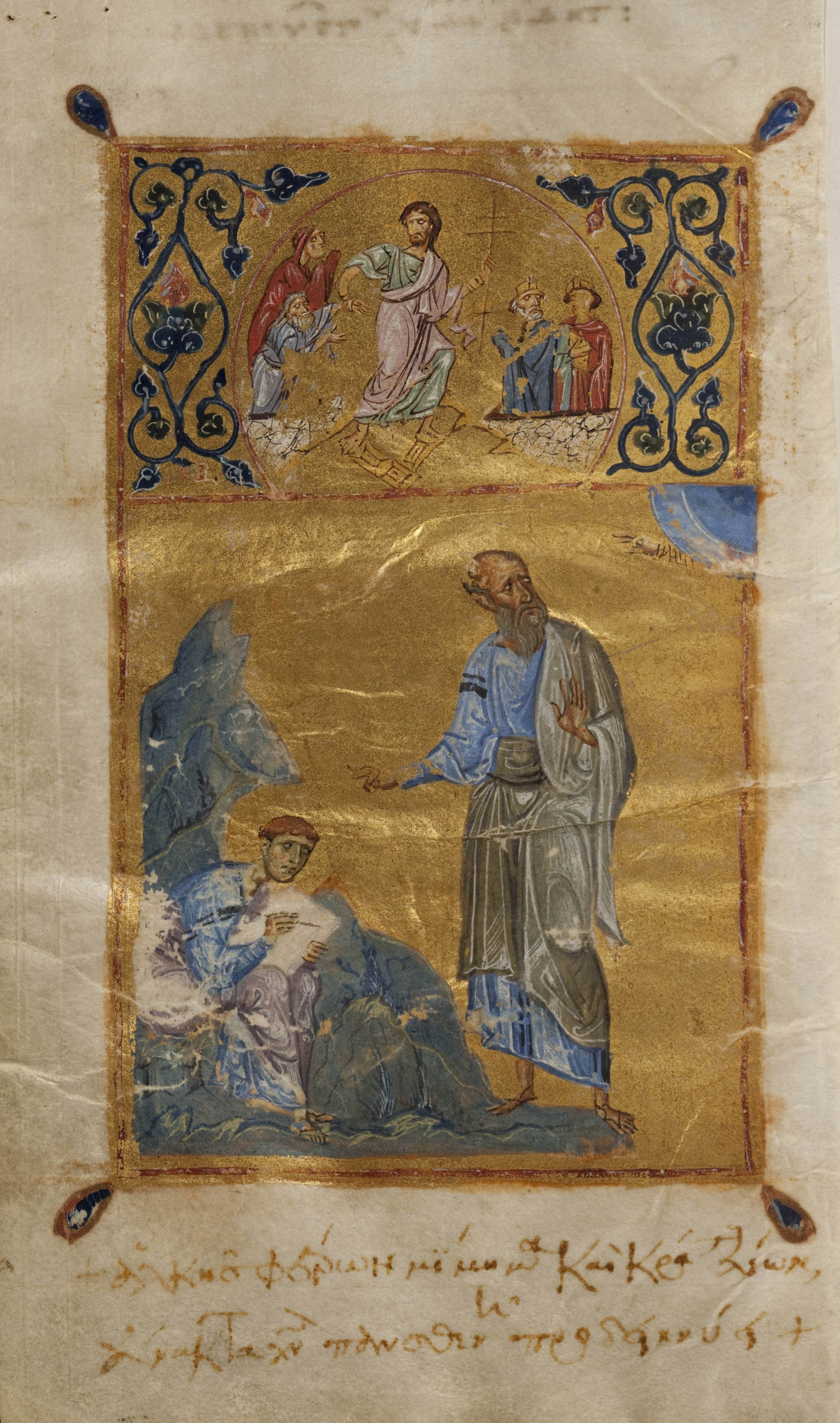 folio 265 verso, portrait of John and Prochor